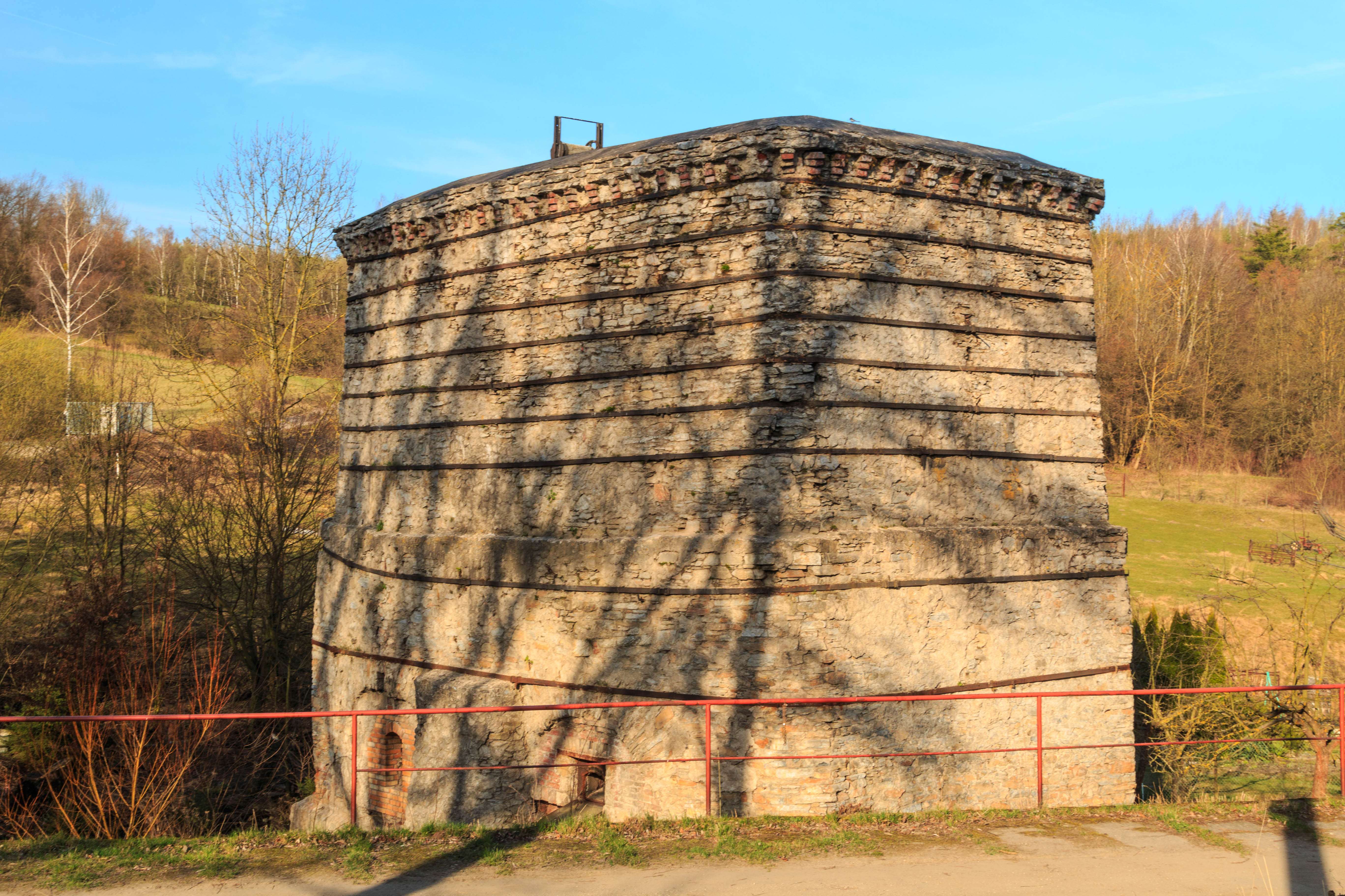 Vápenka, Vápenný Podol 13, na ohybu silnice, Vápenný Podol.